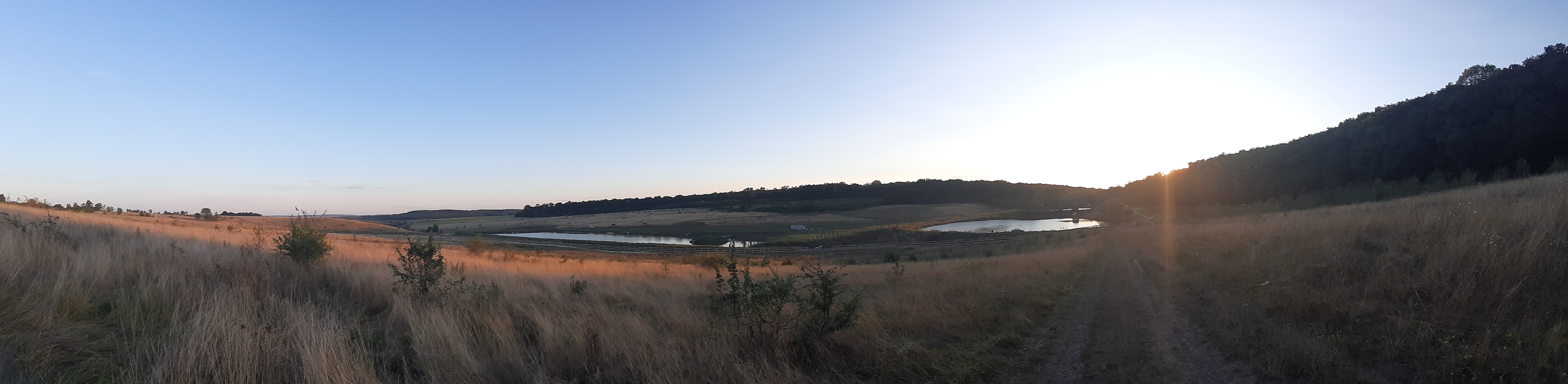 Панорама ставів села Надорожна